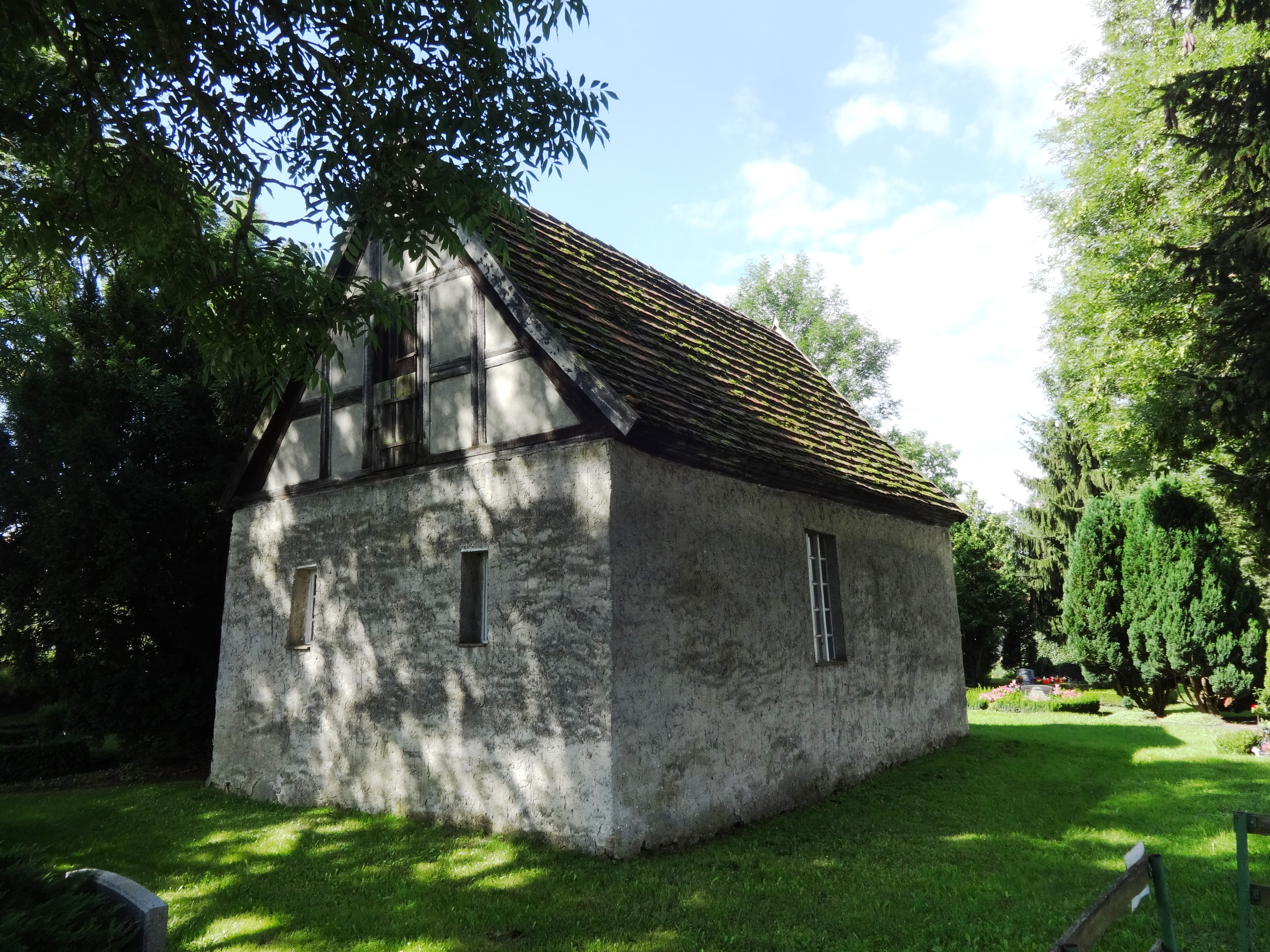 Die Kapelle in Gnevezin in der Gemeinde Bargischow im Landkreis Vorpommern-Greifswald entstand vermutlich im 15. Jahrhundert. Im Innern befindet sich unter anderem ein Kanzelaltar aus der ersten Hälfte des 19. Jahrhunderts.